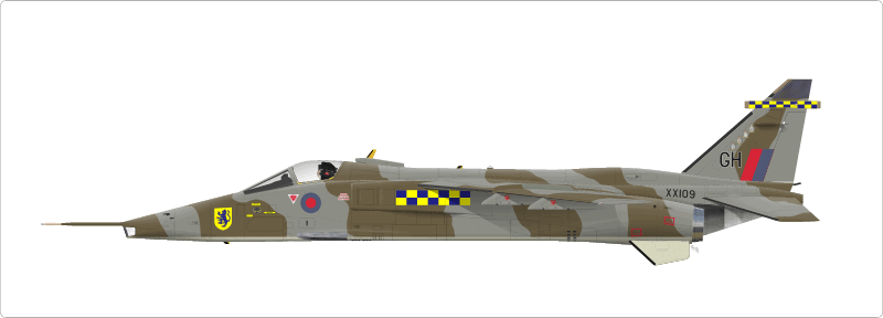 SEPECAT Jaguar GR Mk.I XX109